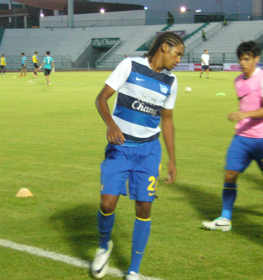 Anderson Dos Santos